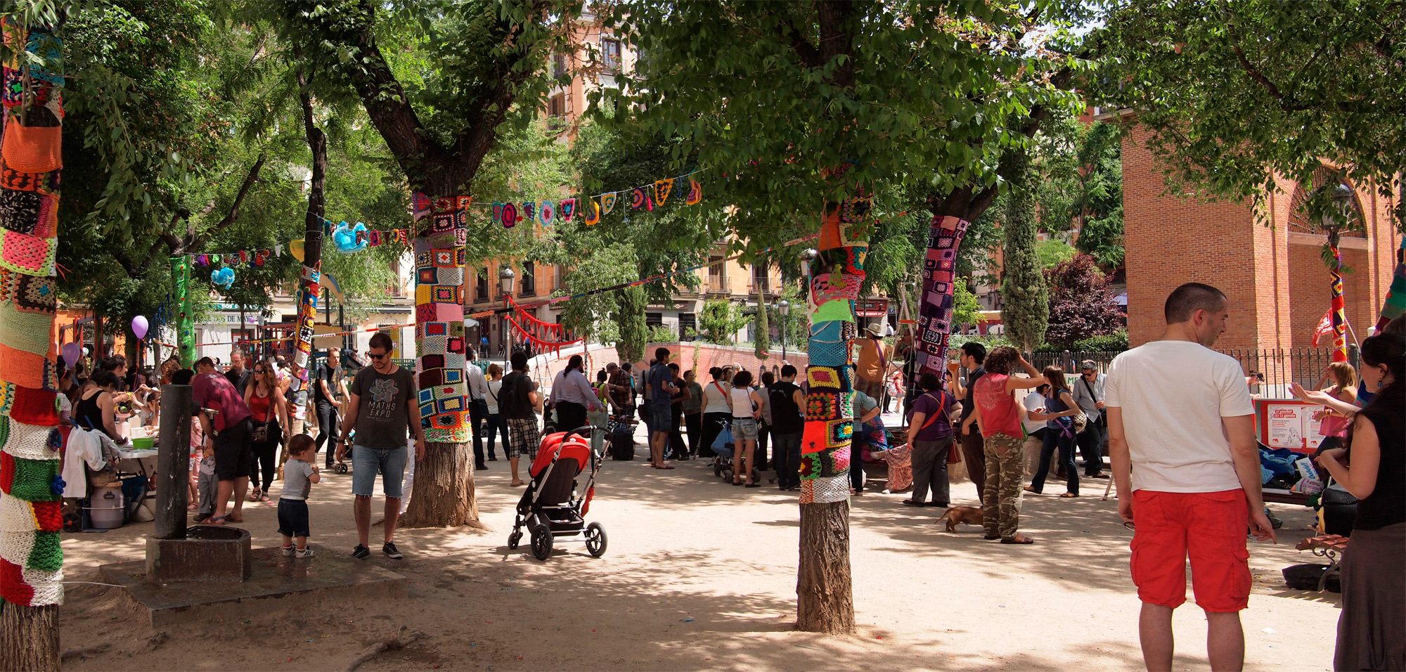 Fiestas del Barrio de Malasaña. Instalación de yarn bombing en la Plaza de Dos de Mayo